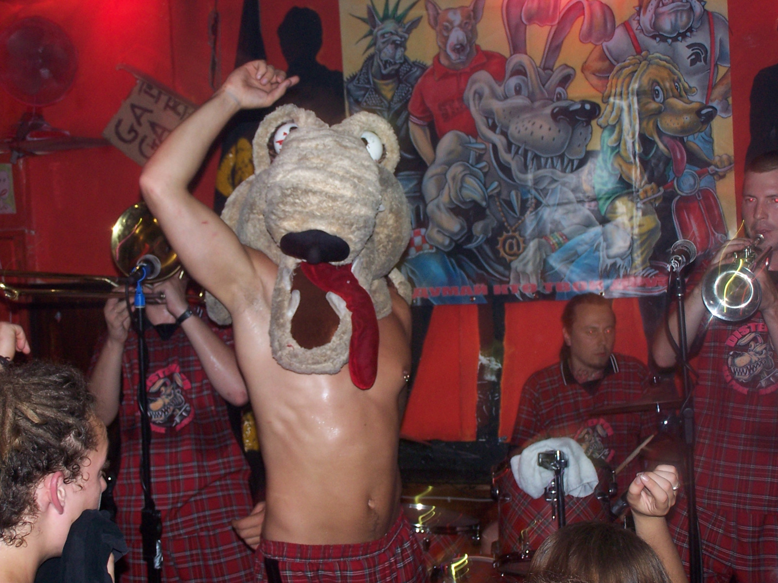 "Alex The Dancing Dog" von der russischen Ska Punk-Band Distemper bei einem Auftritt in Köln am 21.07.2005.